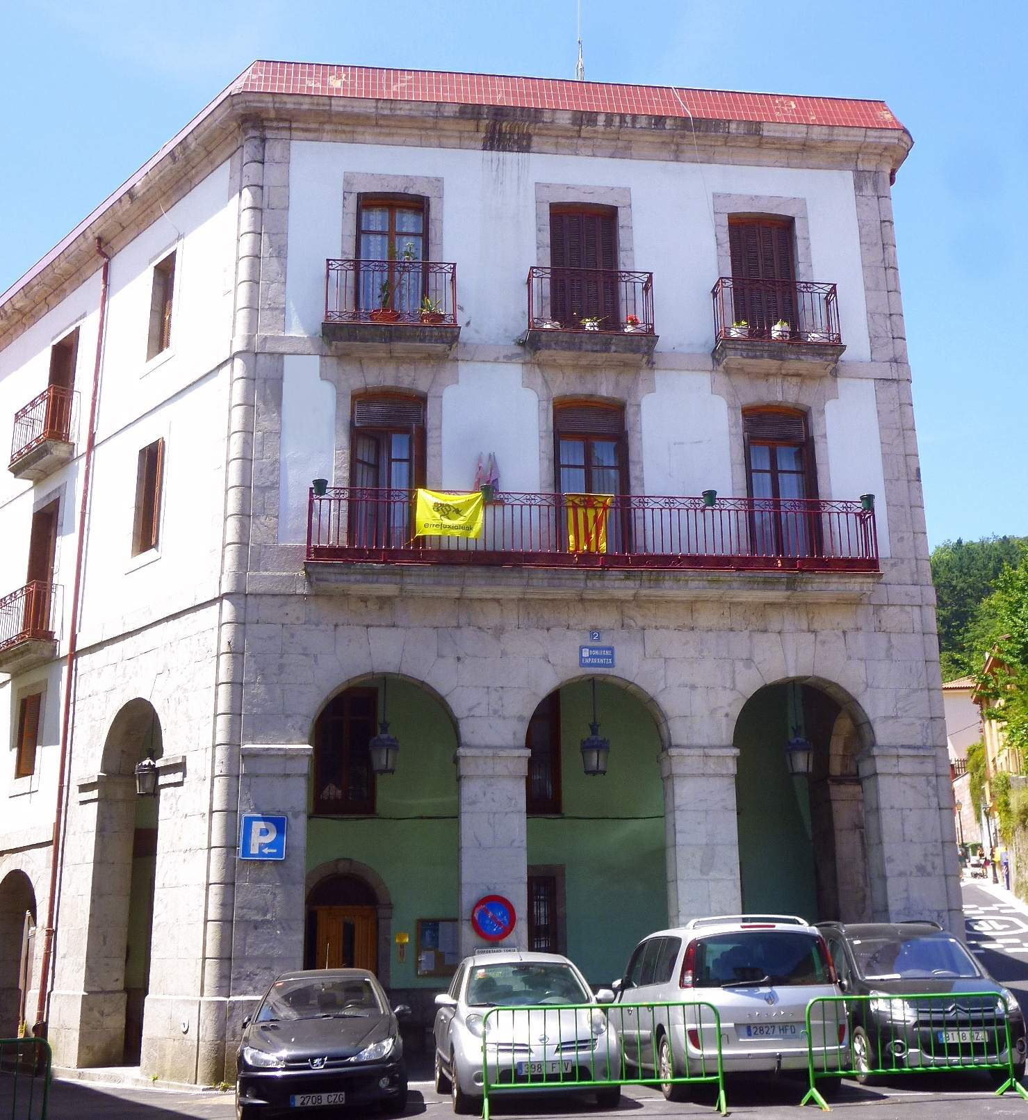 Ayuntamiento de Ea (Vizcaya)